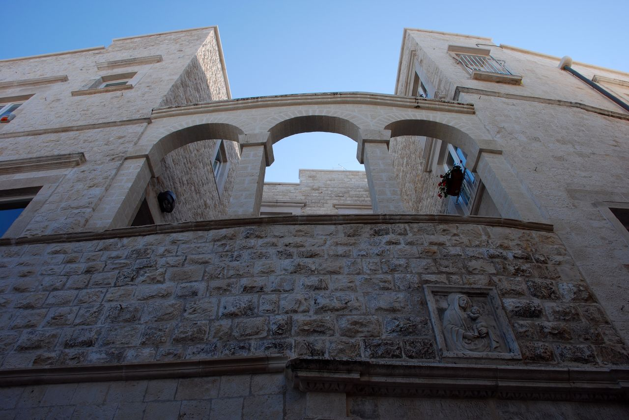 Molfetta - Palazzo del Borgo. Autore:Dantes102 Fonte:Flickr Licenza:Creative commons